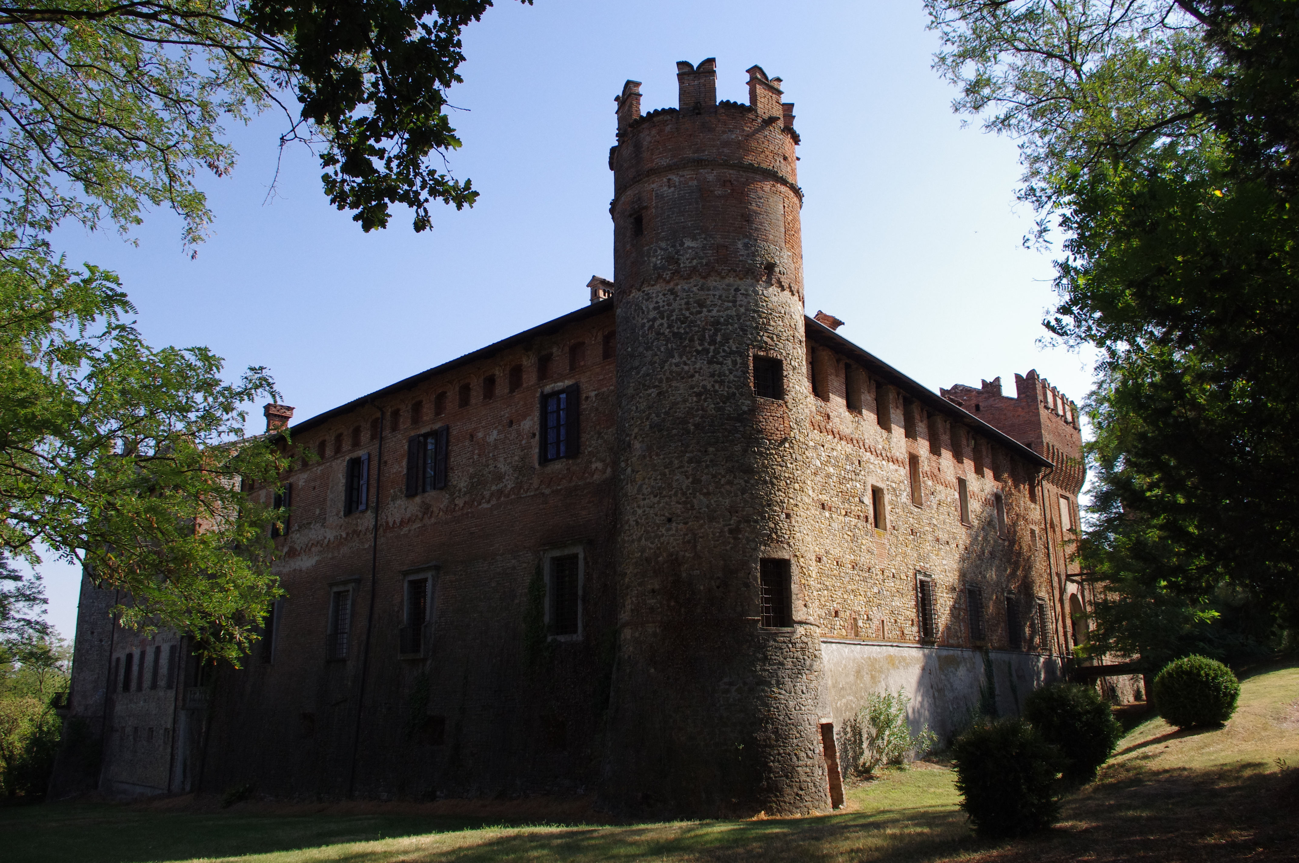 Antico castello della Val Tidone, sorto prima del XIII secolo. Posto in posizione dominante a difesa della Via Francigena.